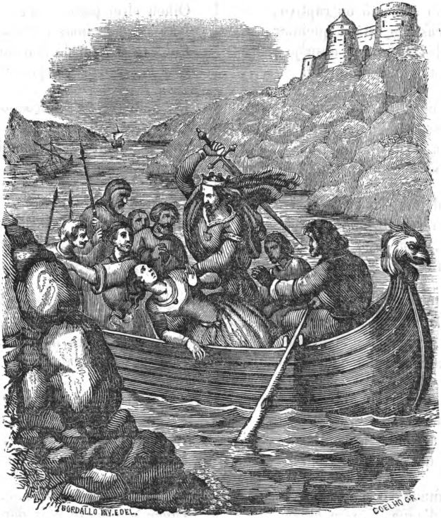 Ilustração da obra poética de Almeida Garrett Miragaia.